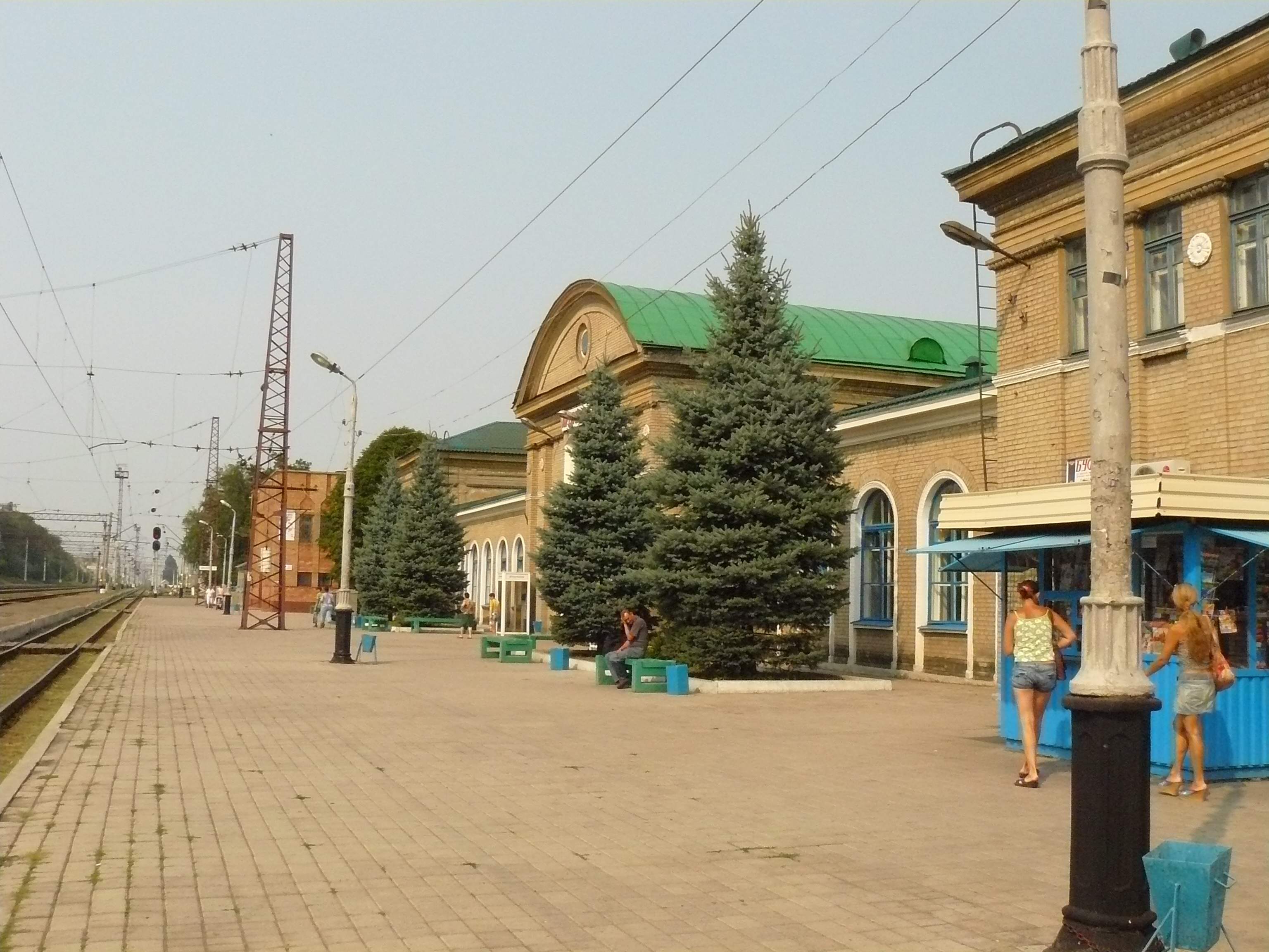 Вид с первой платформы на станцию Артёмовск-2